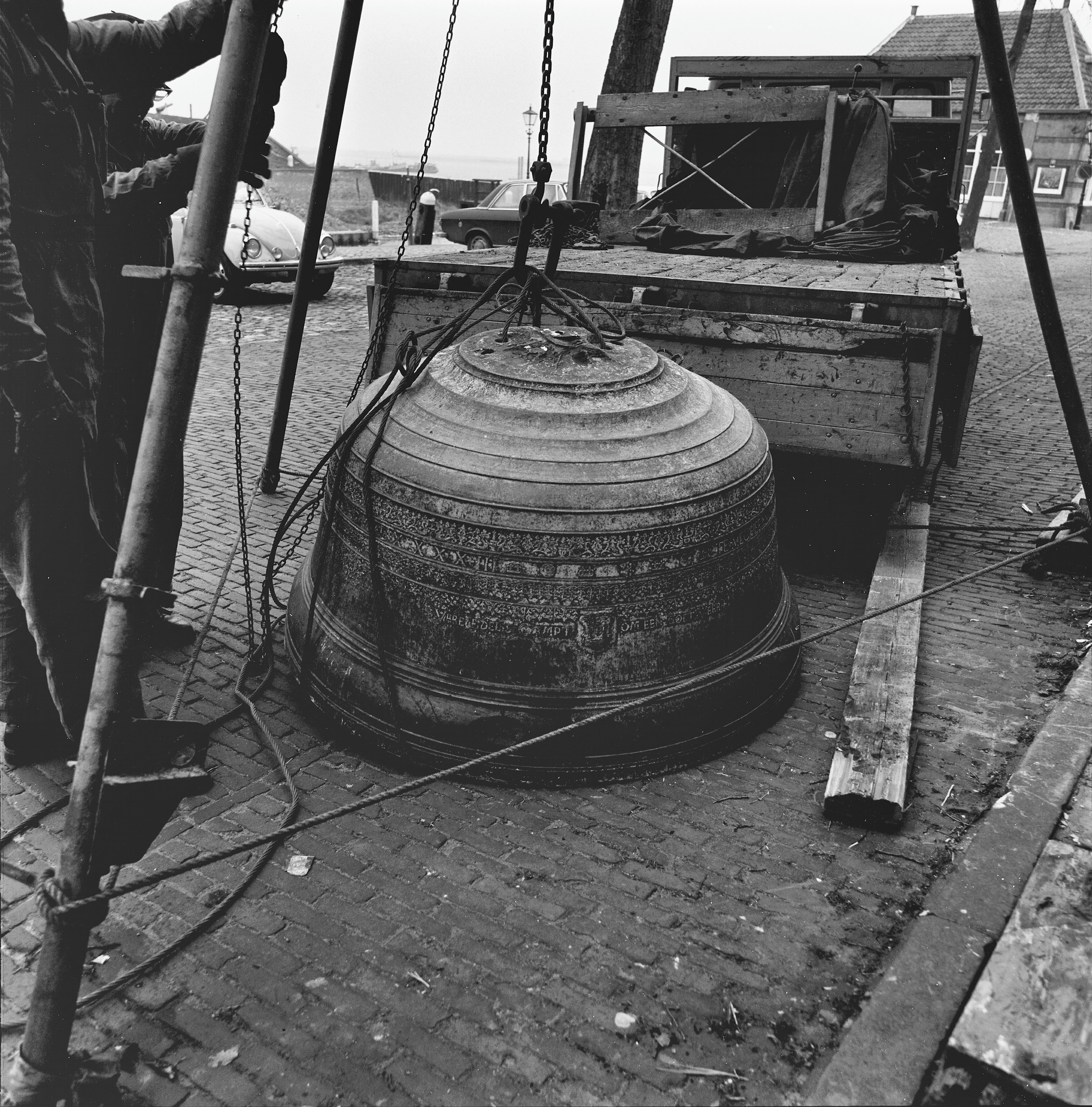 Stadhuis: hemisferische kombel uit 1593 van Peeter II van den Gheyn